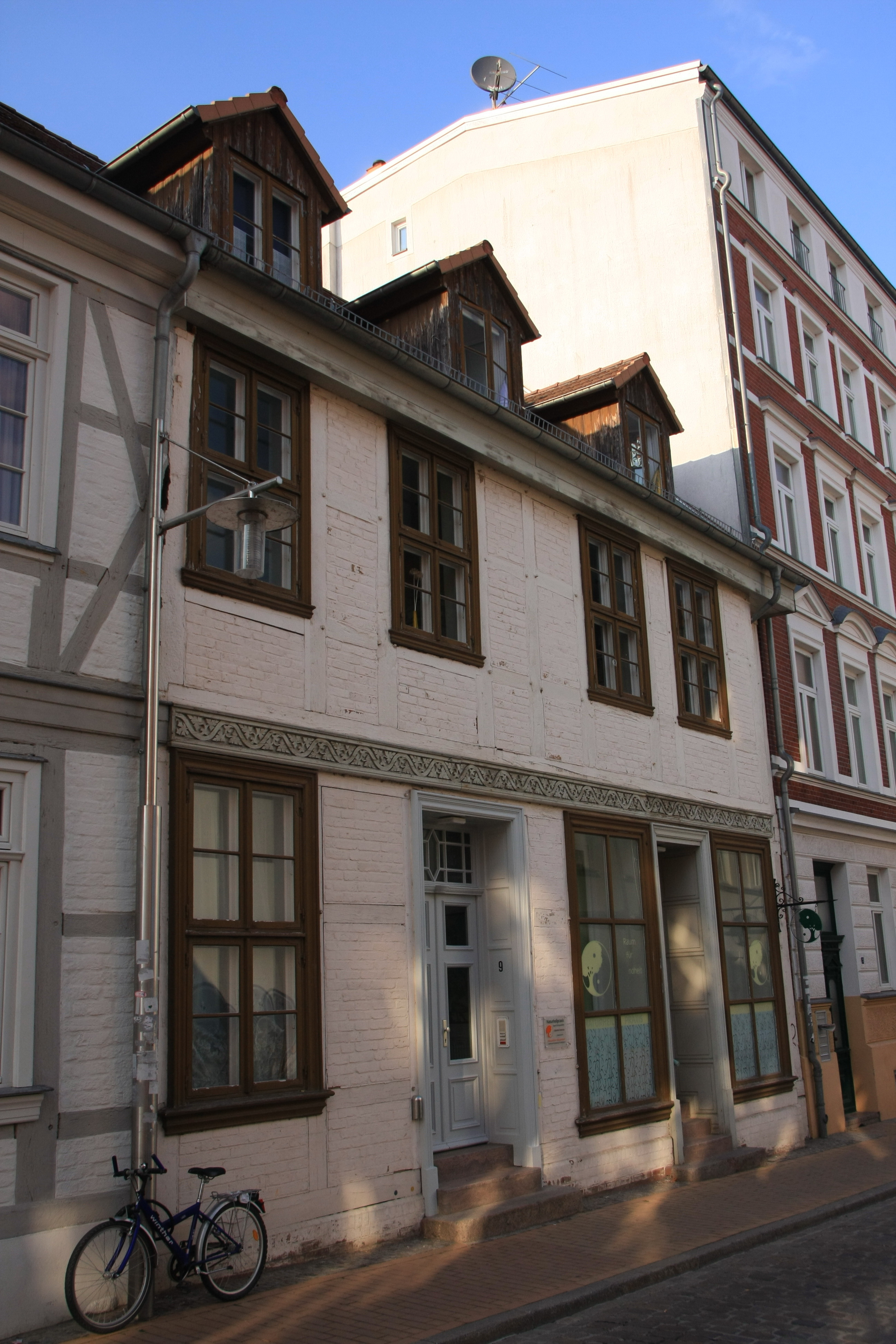 19055 Schwerin, Münzstraße 9